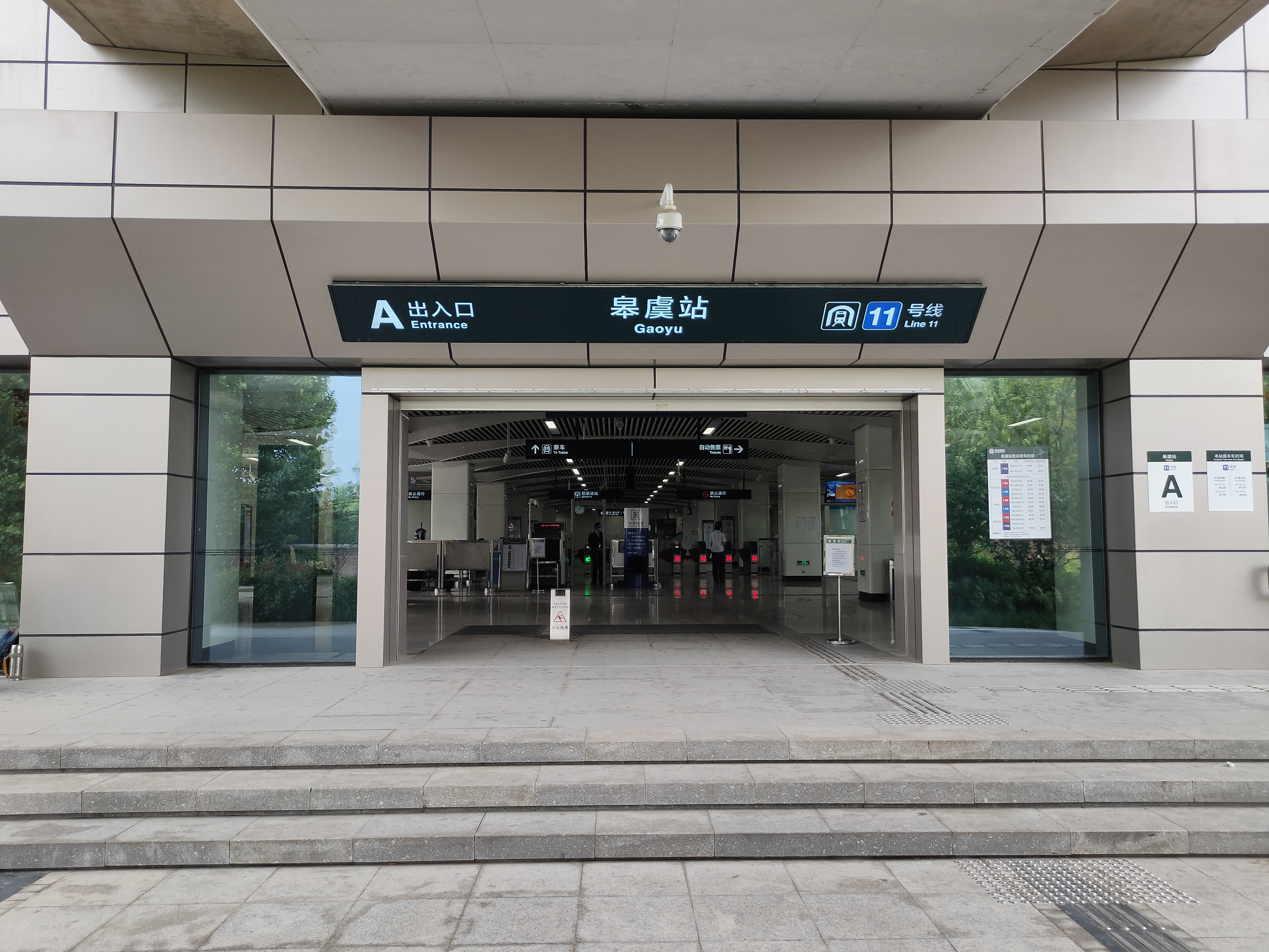 中文（中国大陆）: 青岛地铁11号线皋虞站A出入口